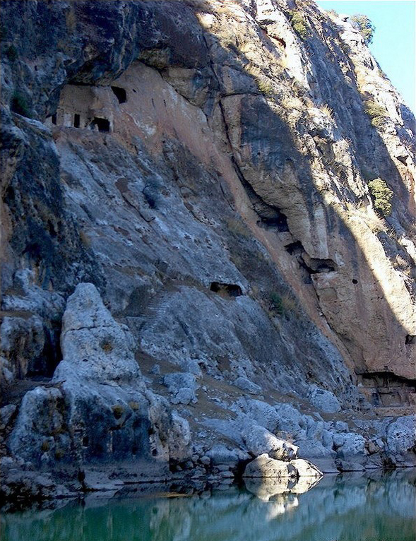 Kurdî: Bûk û zava